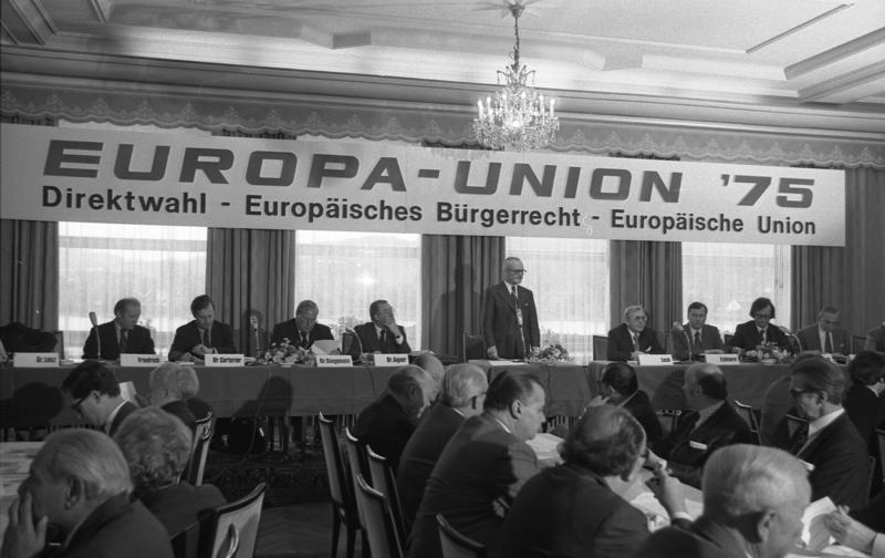 22. Ordentlicher Kongreß der Europa-Union Deutschland im Rheinhotel Dreesen, Bad Godesberg